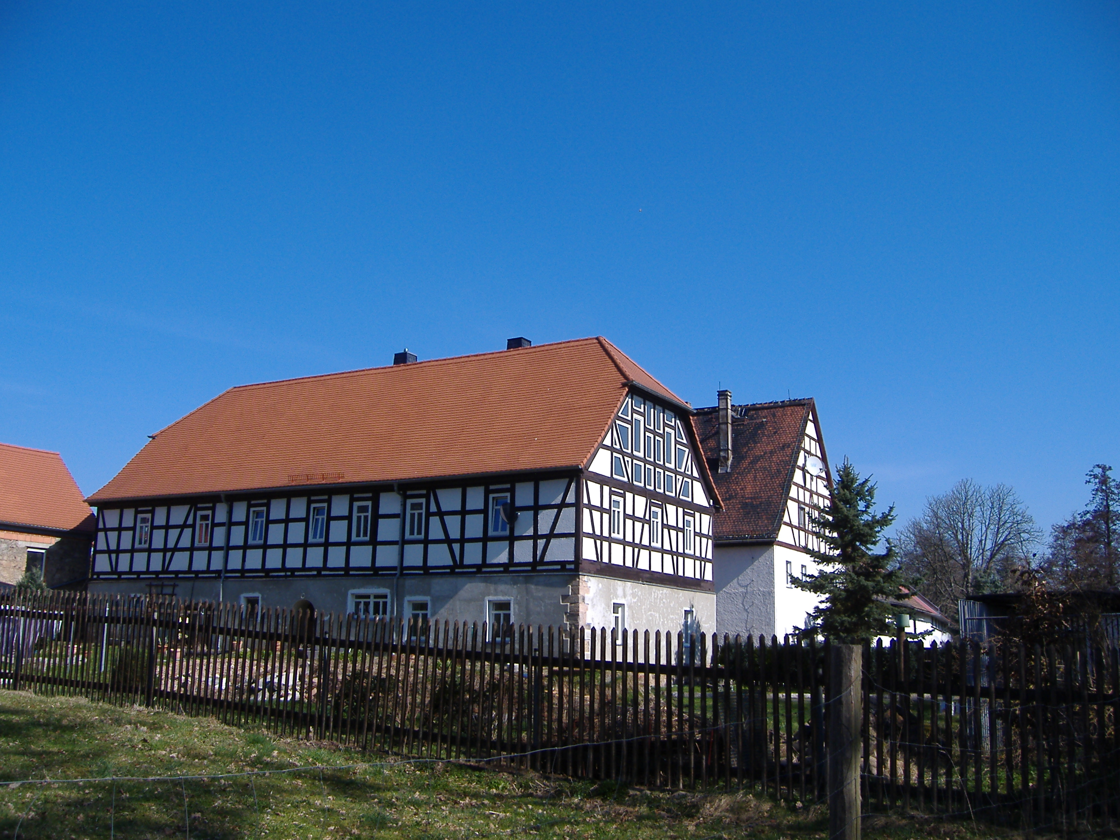 ehemaliges Rittergut in Ruppertsgrün (Fraureuth), Sachsen